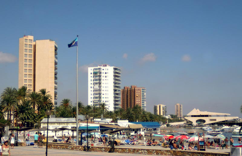 Santiago de la Ribera, en el municipio de San Javier (Murcia, España)